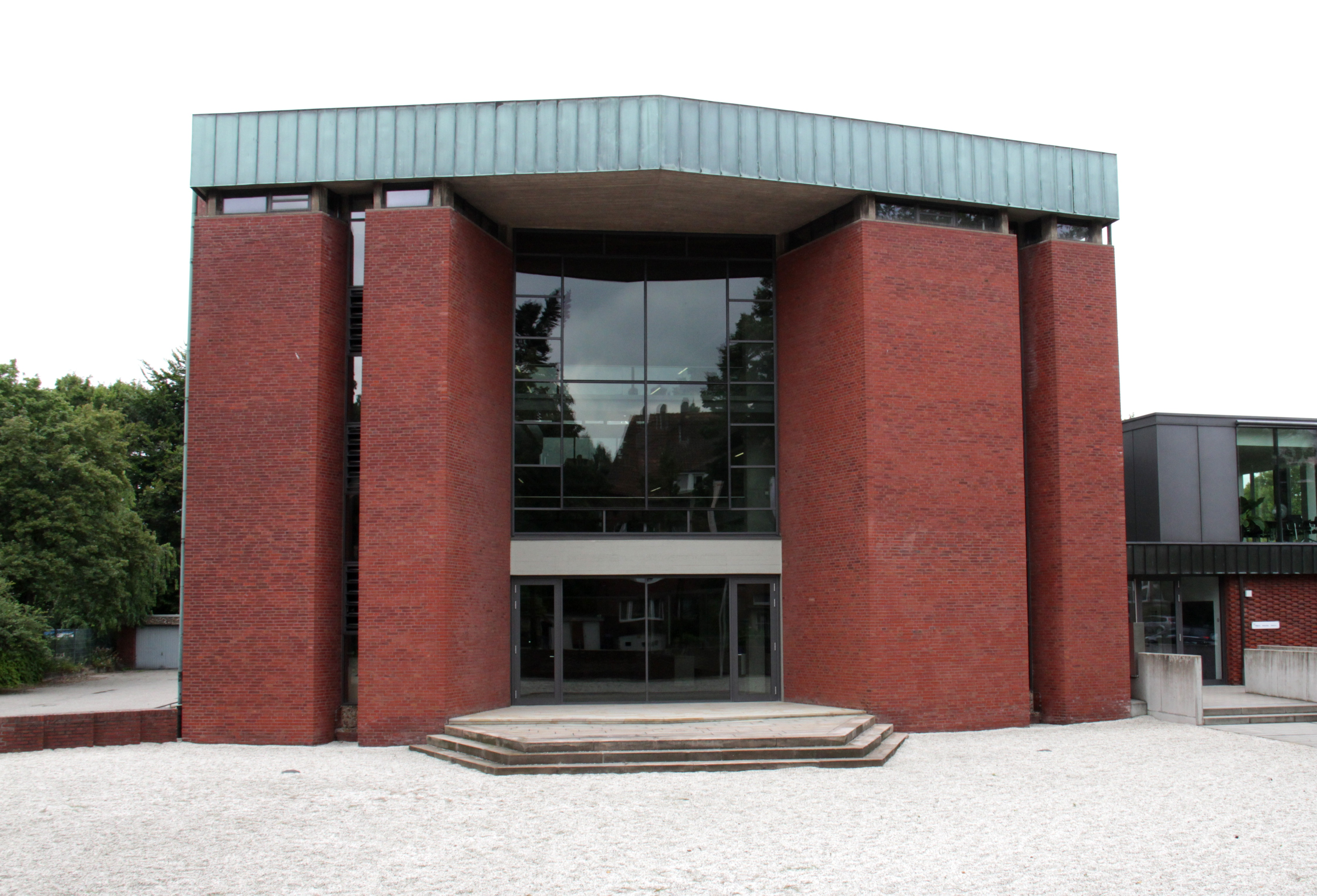 Profanierte Bonifatiuskirche in Münster